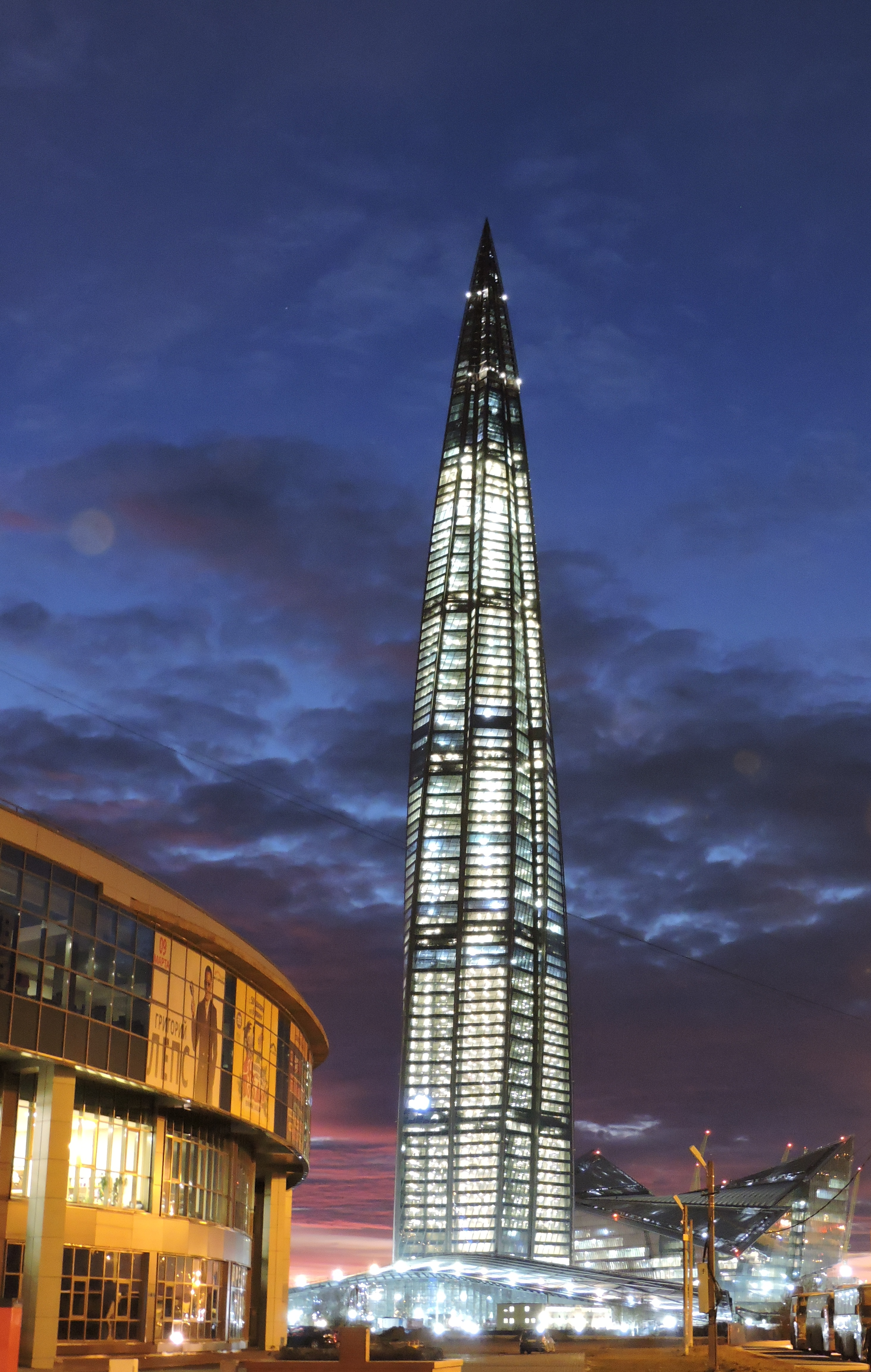 Лахта-центр 30 ноября 2018